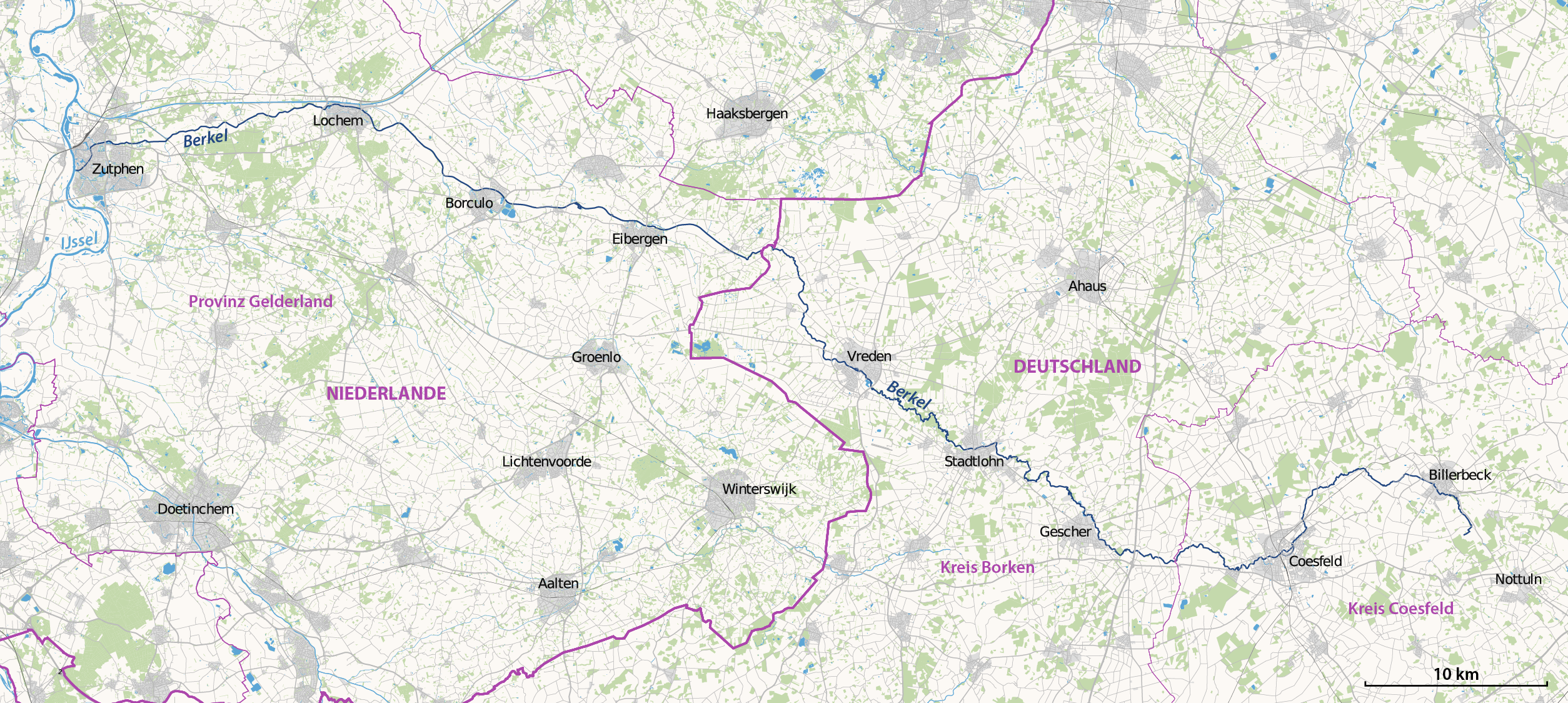 Karte der Berkel